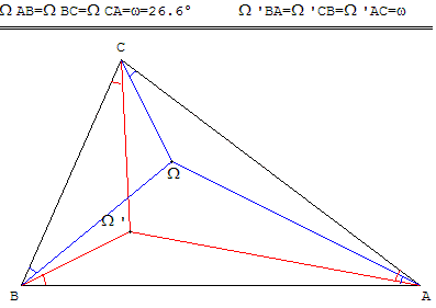 Points de Brocard